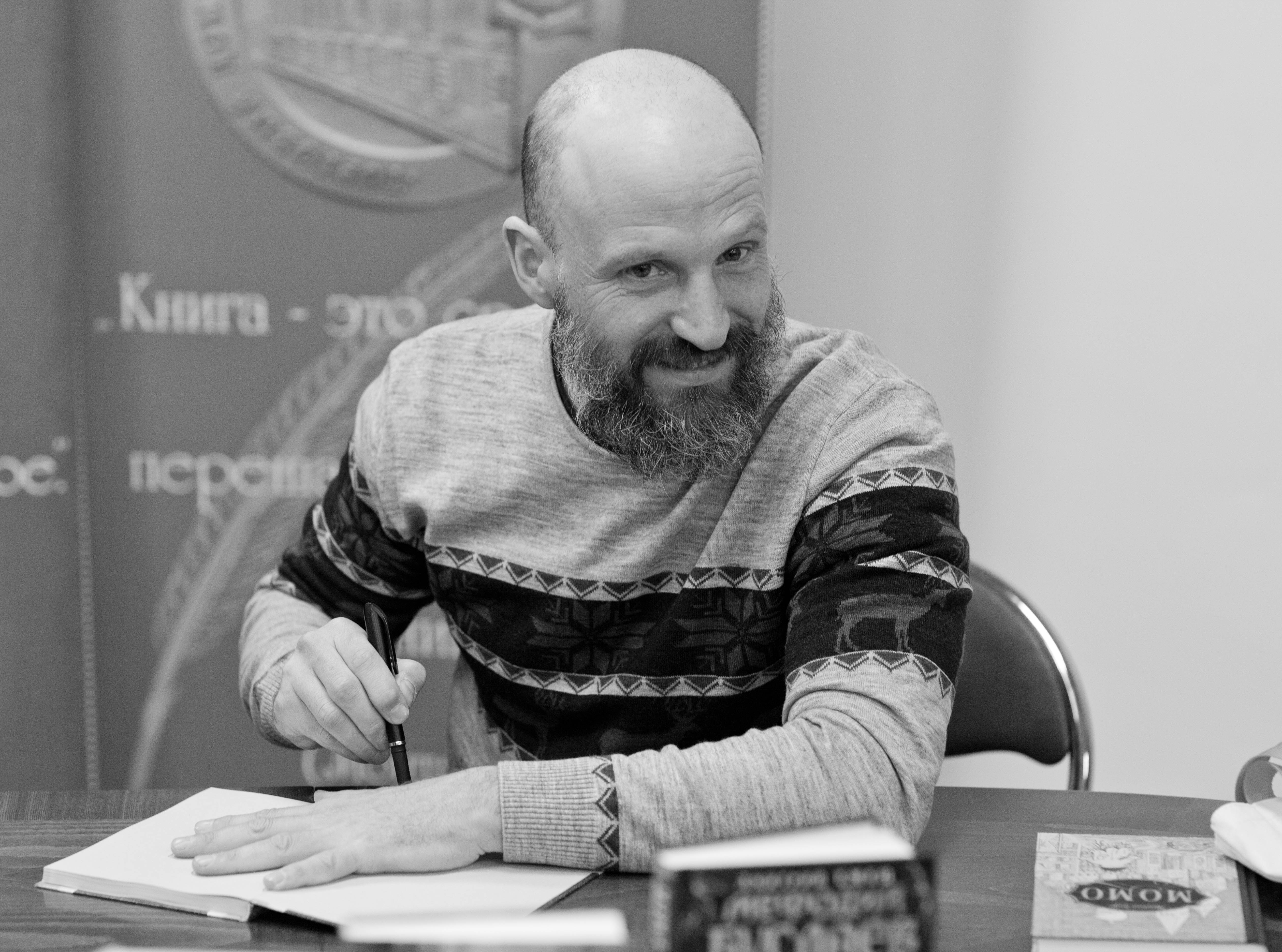 Писатель Дмитрий Емец на встрече с читателями в книжном магазине Библио-Глобус (Москва)